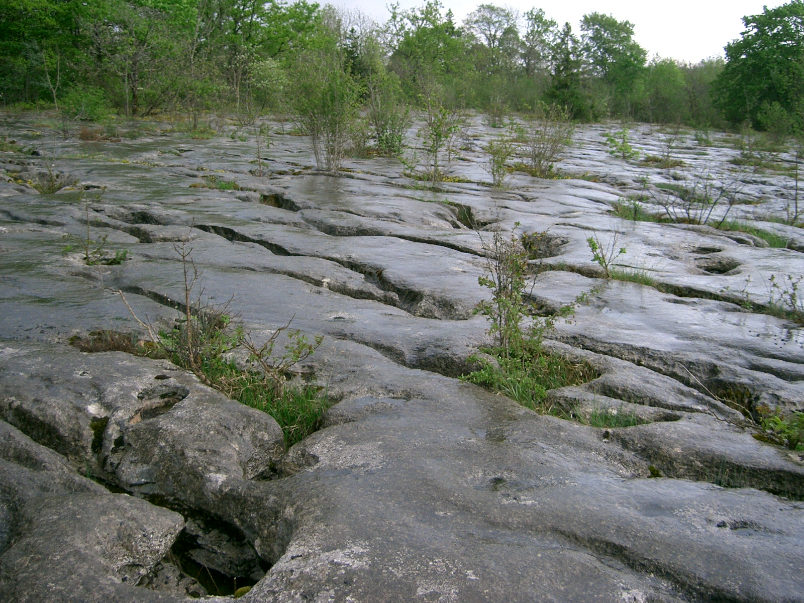 "Lapiaz" Curiosité géologique - relief karstique du Jura